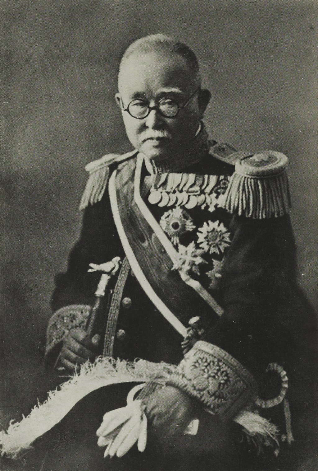 Portrait of Tatsuo Yamamoto (山本達雄, 1856 - 1947)